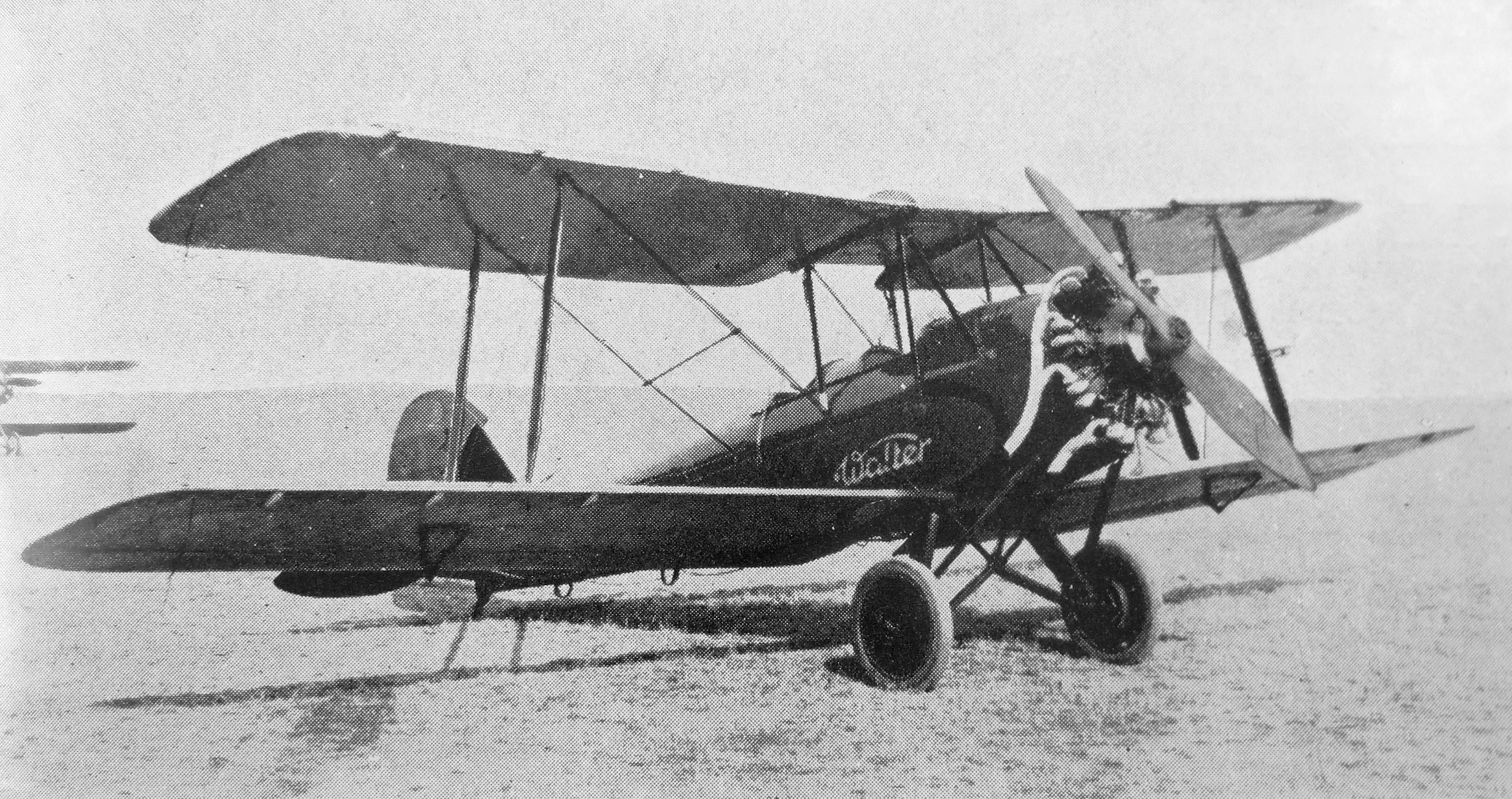 Walter Mars a Caproni Ca.100 (Kaproni Bulgarski KB-1 Perepuda